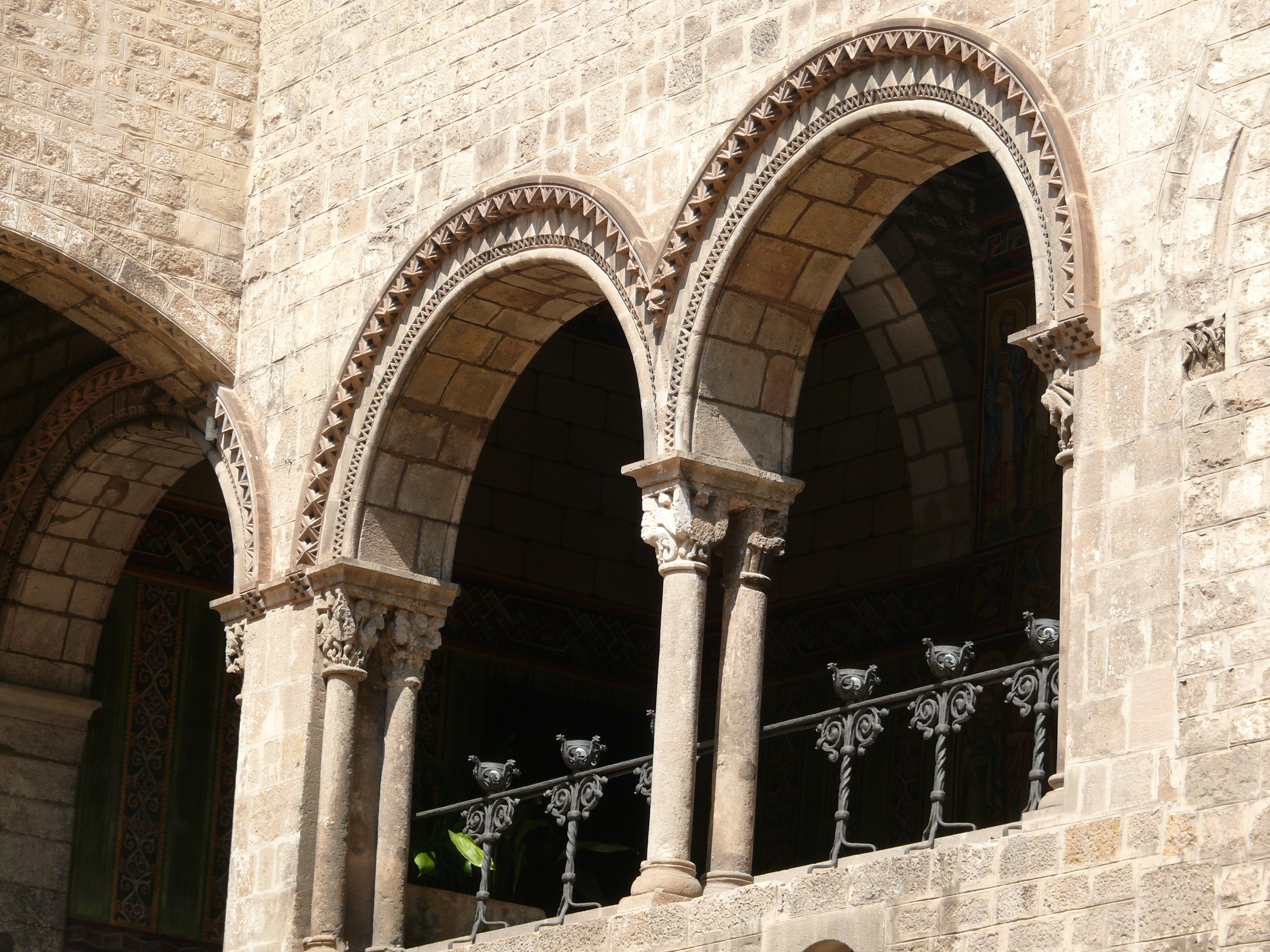 Palau del Bisbe (Barcelona)